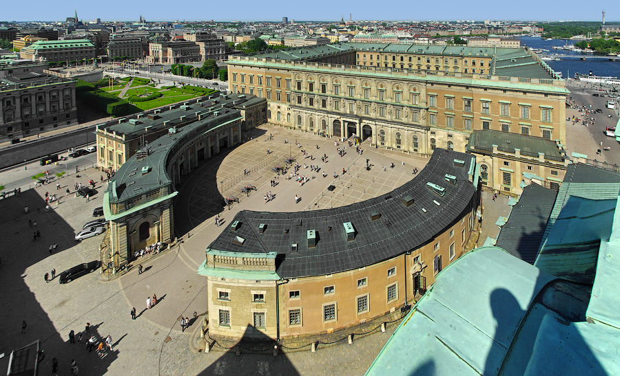 Kungliga slottet i Stockholm, sett från Storkyrkans torn